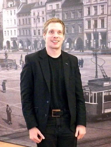 PhDr. Lukáš Karnet